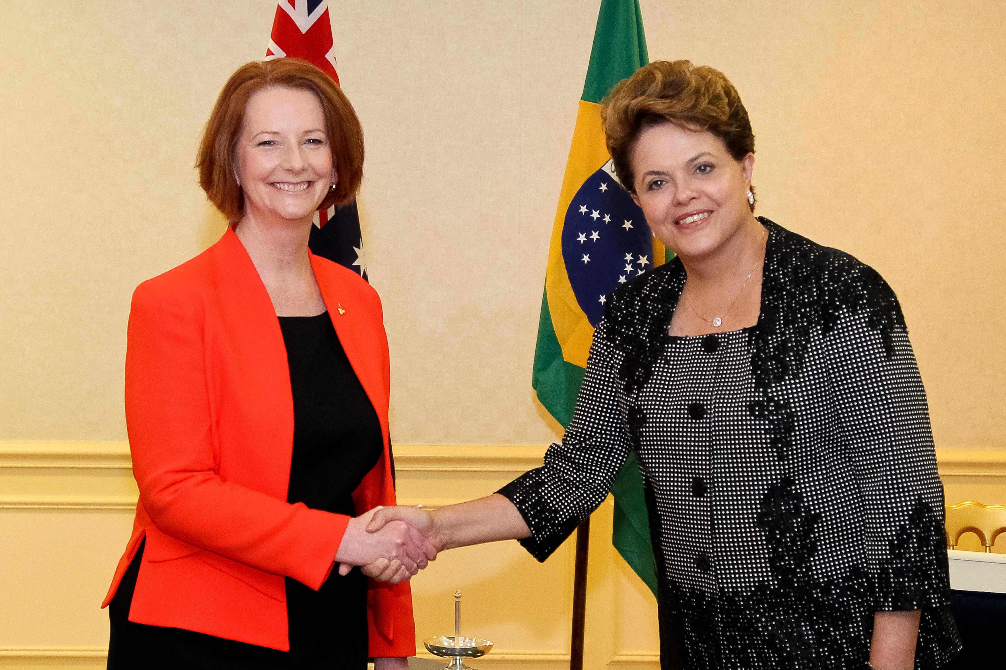 Cannes - França, 02/11/2011. Presidenta Dilma Rousseff durante encontro com Julia Gillard Primeira-ministra da Austrália. Foto: Roberto Stuckert Filho/PR.